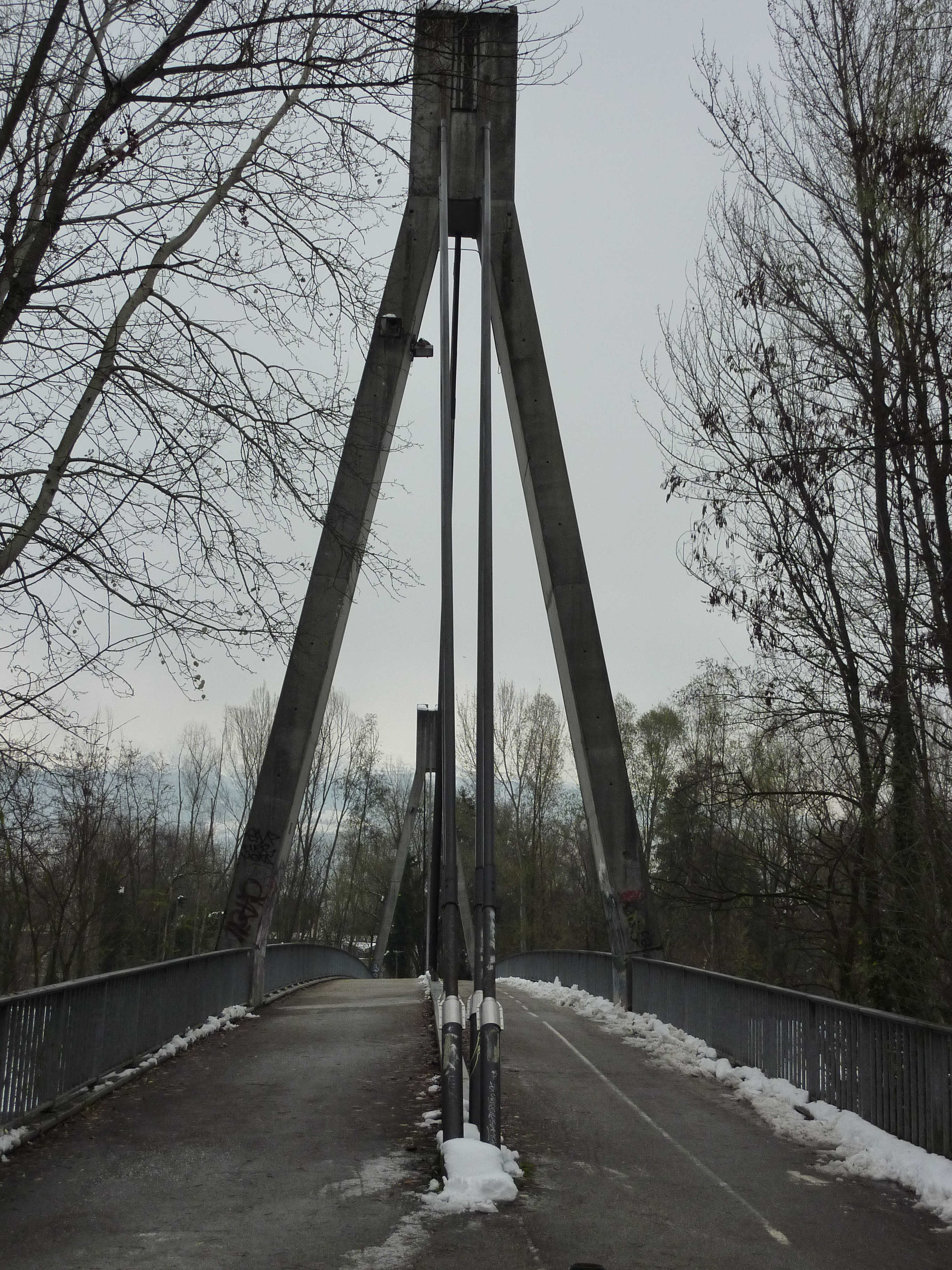 pile de la passerelle de Meylan, en Y inversé